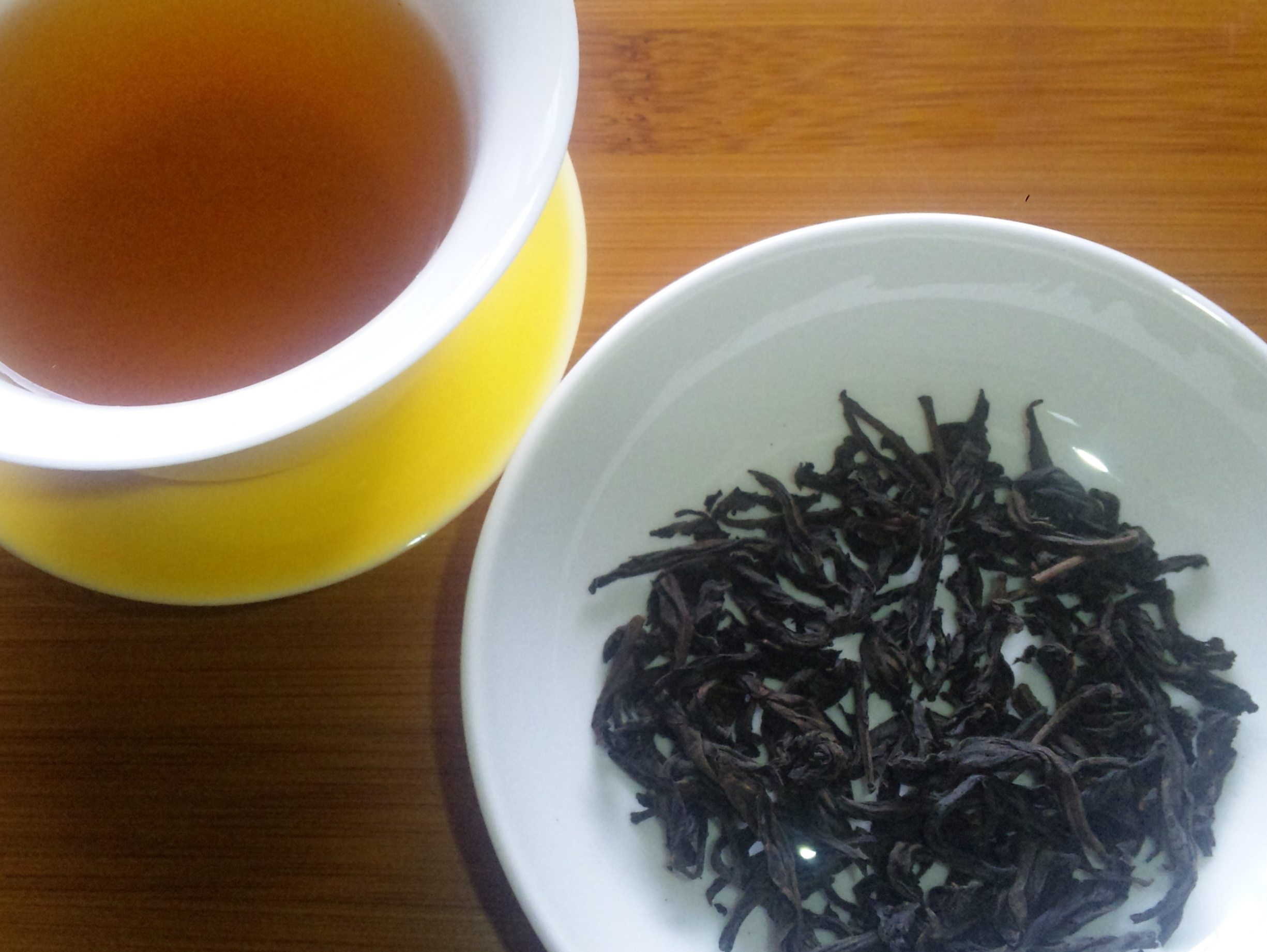 大紅袍の茶葉と水色